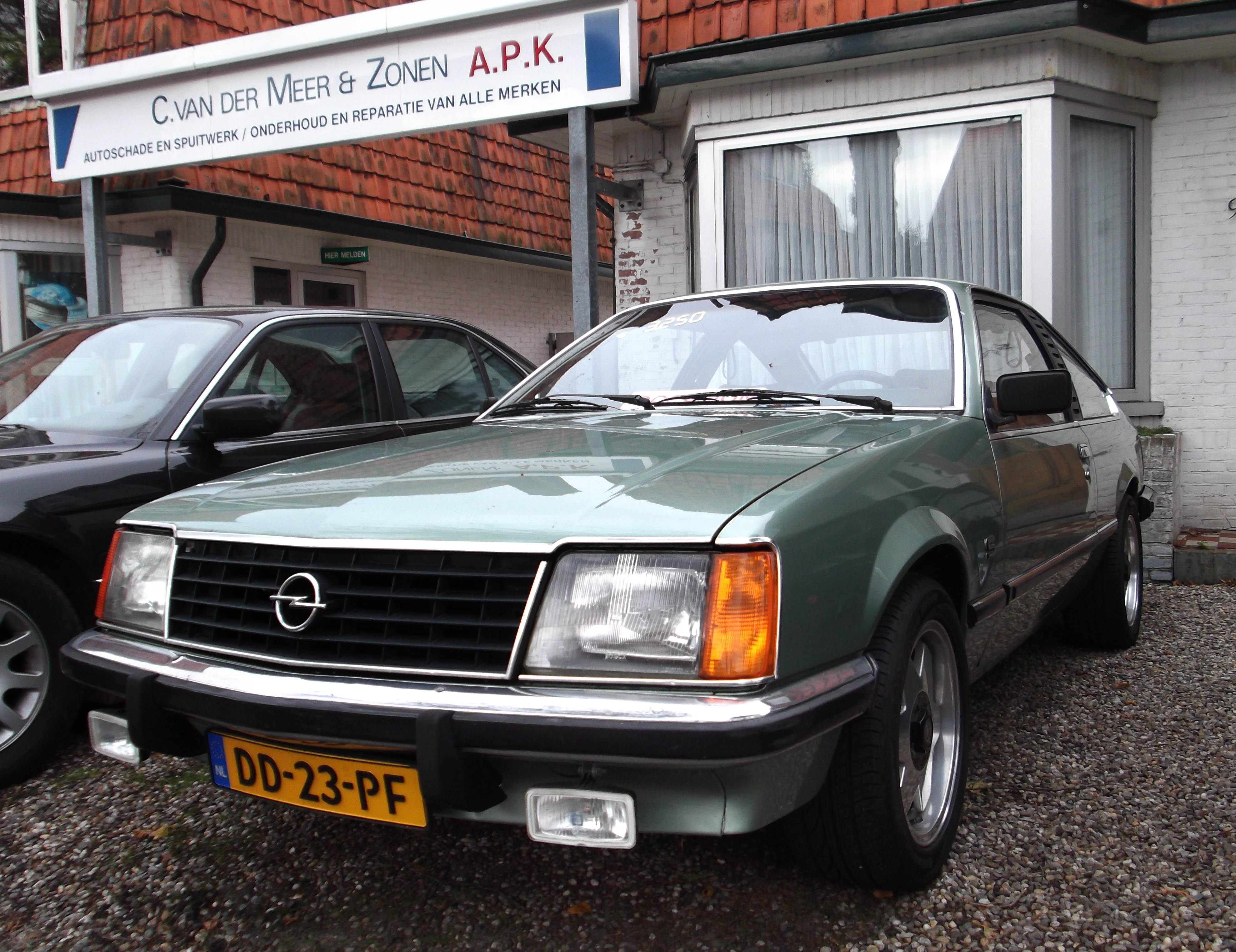 1978. For sale!